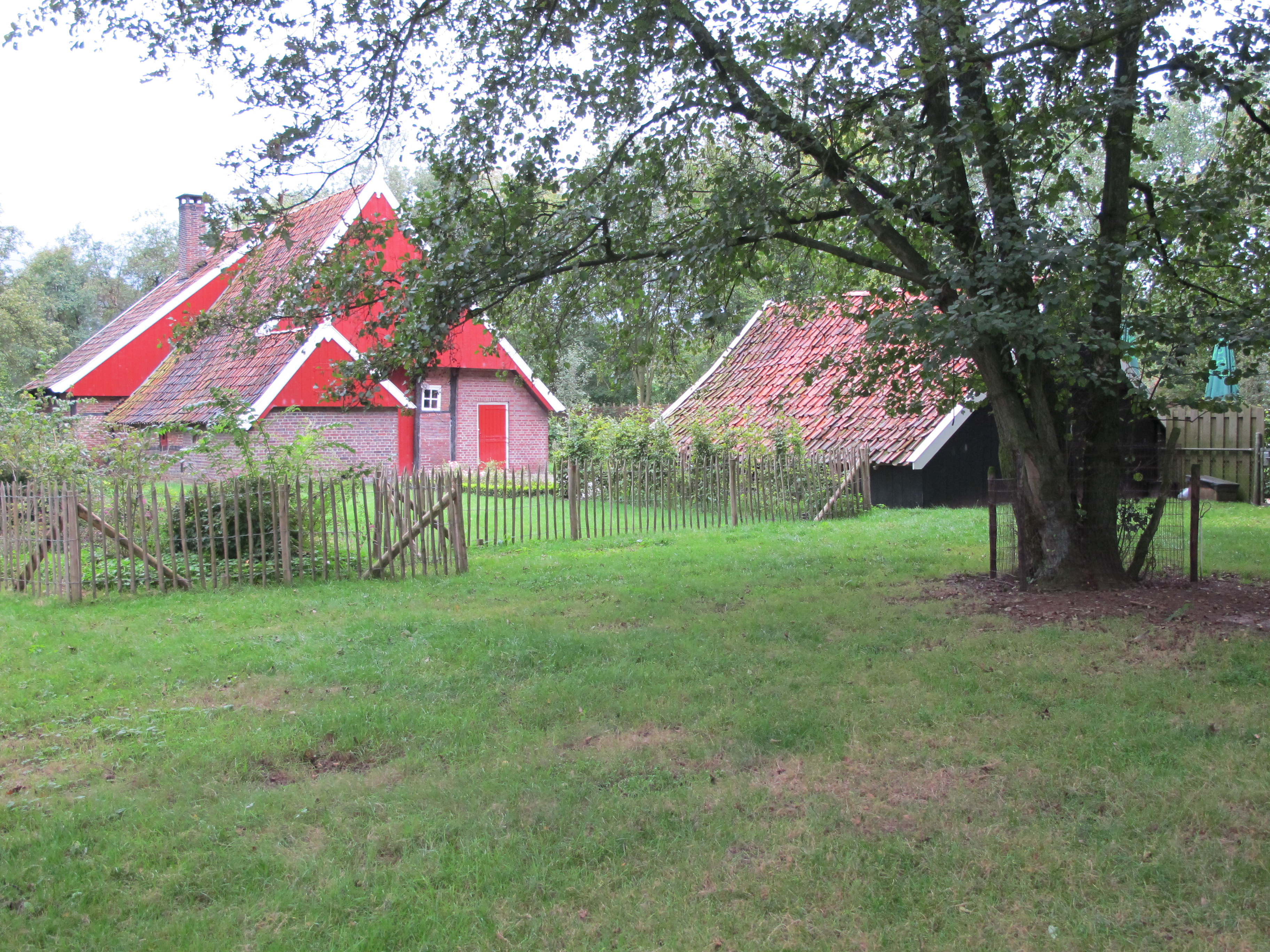 Slingeweg 11, Winterswijk-Brinkheurne